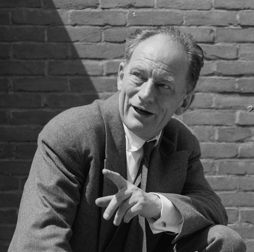 Filmopnamen "Ciske de Rat" in Cinetone Studio's, regisseur Wolfgang Staudte [de film werd ook in een Duitse versie met Duitse acteurs uitgebracht, red.]